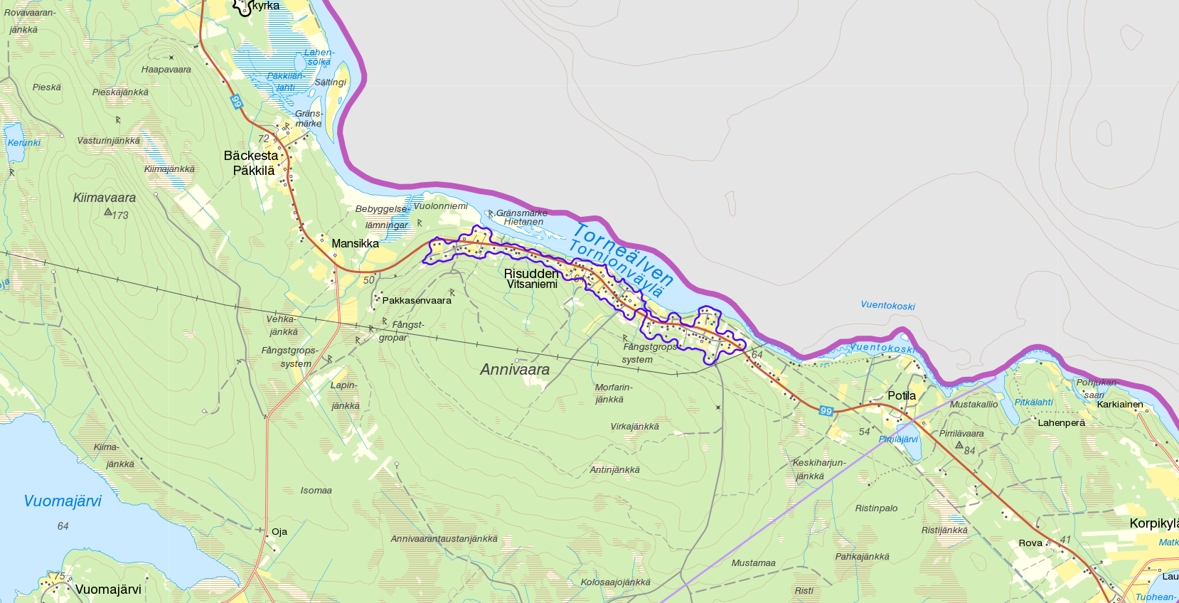 Småorten Vitsaniemi/Risudden med gränserna från Statistiska centralbyråns småortsavgränsning 2015 i lila. Del av tätorten Hedenäsets gränser från 2015 syns i kartans nordvästra hörn i svart. Bakgrundskarta från Lantmäteriet, skala 1:30 236.